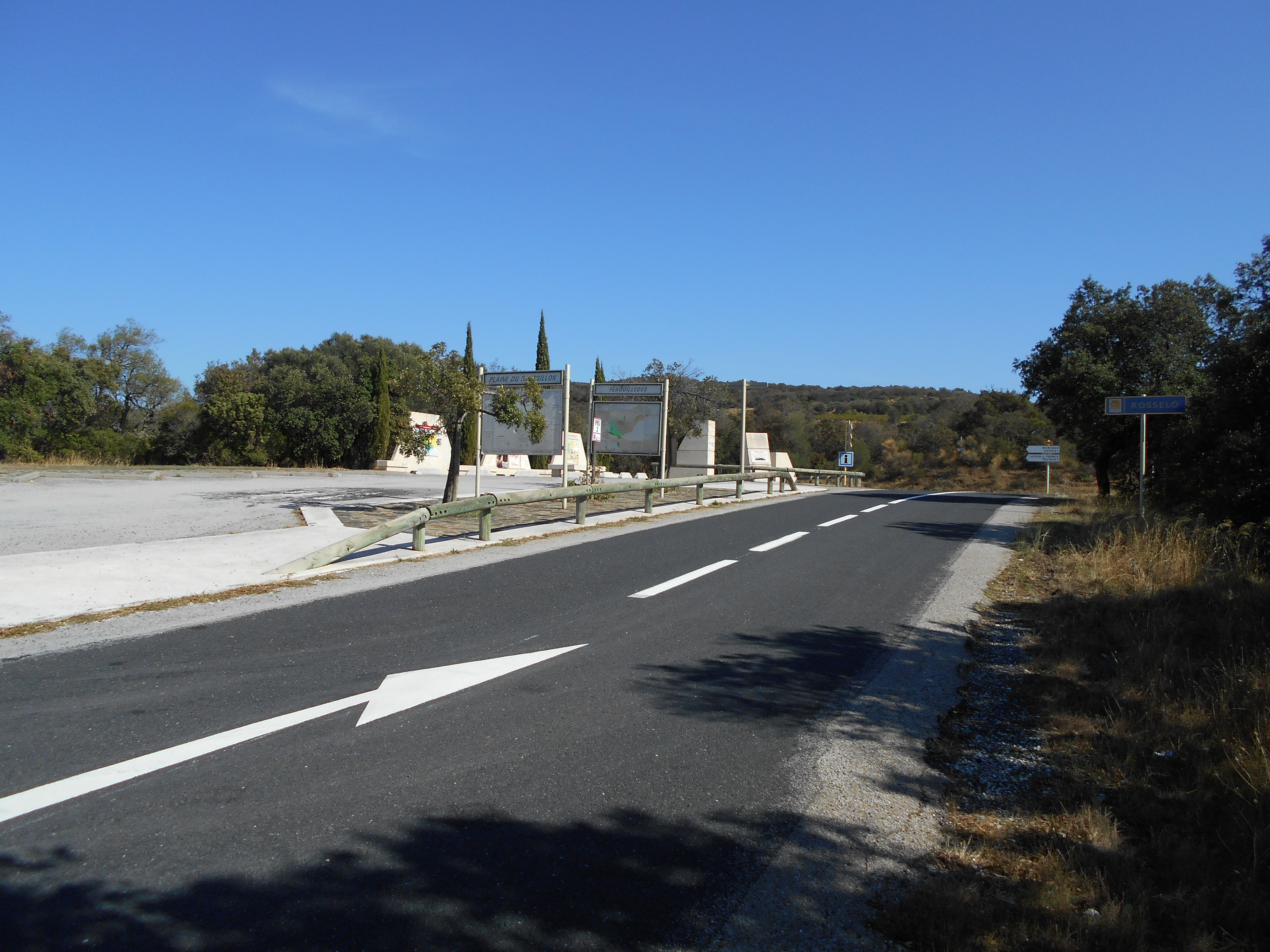 El Coll de la Batalla, a Caladroer - Millars.